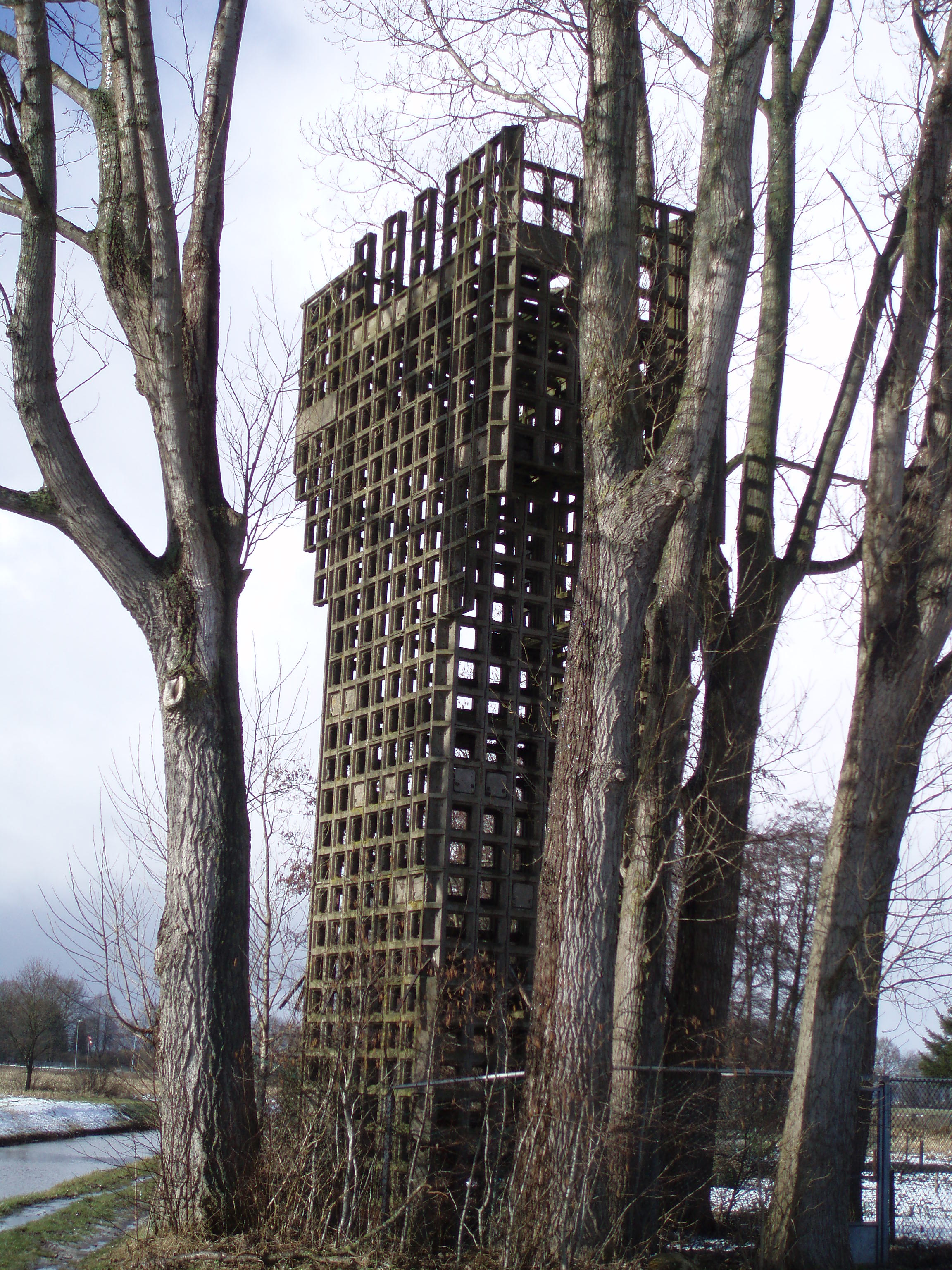 Uitkijktoren aan het Schoonebeker diep aan de grens tussen Nederland en Duitsland. Het betreft Luchtwachttoren '7Z3 - Oud Schoonebeek'